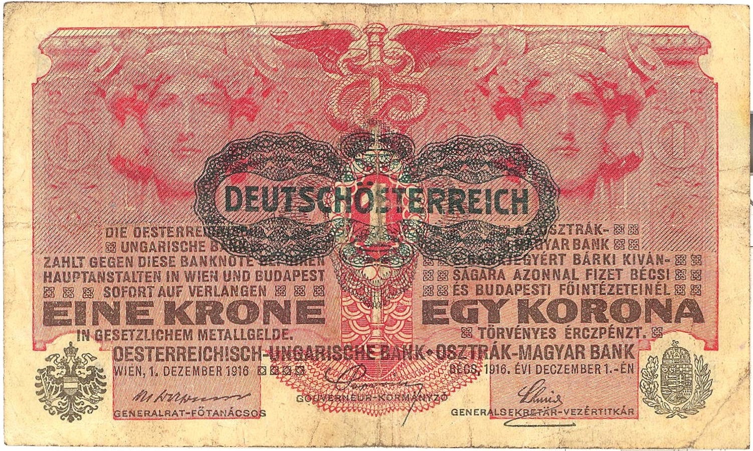 Ricordi di famiglia - fotografia del soldato Egidio Ferrante appartenente al corpo fotografi del Regio esercito italiano morto nel 1921 per ferite riportate durante il conflitto. Era stato ferito presso un ponte sul fiume Tagliamento durante la ritirata di Caporetto - cartolina postale di guerra viaggiata 22 aprile 1921. L’ultima cartolina spedita da Egidio Ferrante dal sanatorio - cartolina postale di guerra viaggiata 11 dicembre 1915. La cartolina fa riferimento alla data di partenza per la zona di guerra - serie di banconote austroungariche (alcune costituiscono le ultime emissioni di banconote da parte della Zecca Imperiale)- copia originale della rivista austroungarica “Osterreichs Illustrierte Zeitung” 30 aprile 1916 (archivio di famiglia) - manufatto :braccialetto realizzato da una corona di forzamento in rame di una granata lavorata finemente e incisa riportante la seguente iscrizione “ricordo Pasubio 26-7-17m - coltello con rebbio ricavato da corona di forzamento. Di granata lavorato a metà e rinvenuto presso la Baracca Comando di Bocchetta Campiglia della 33° Compagnia del 5° Reggimento Genio che realizzò la Strada delle 52 Gallerie del Monte Pasubio